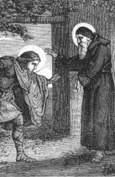 Clodoald ou Saint-Cloud (522-560), petit-fils de Clovis Ier